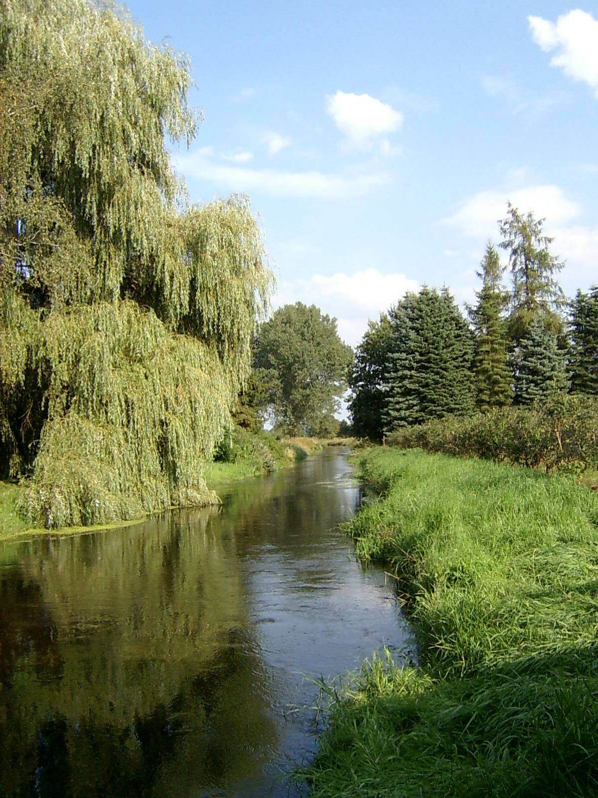 Die Gerdau (Fluss in Niedersachsen) an der Kanu-Einsatzstelle in Groß Süstedt. The Gerdau (river in Lower Saxony, Germany) by the canoe launch site.